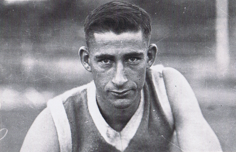 George Doig